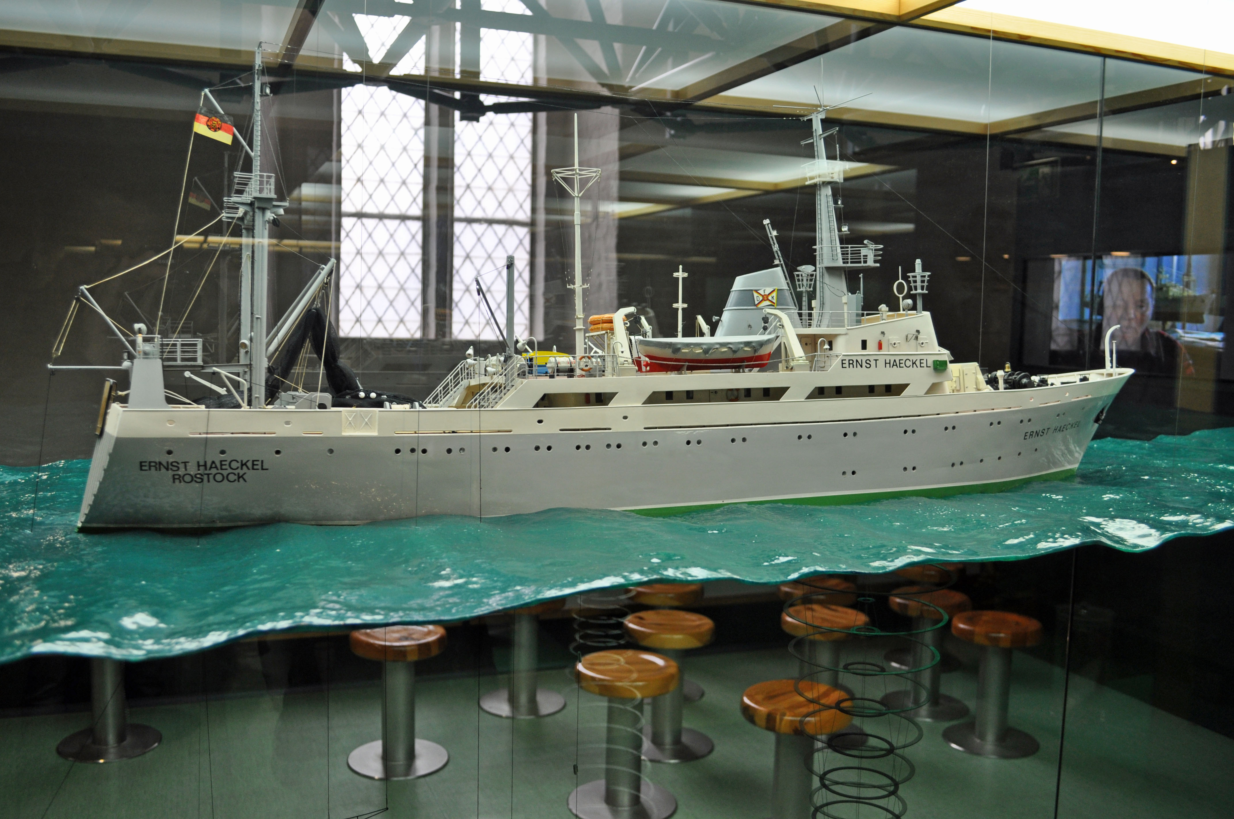 Im Meeresmuseum Stralsund. Das Deutsche Meeresmuseum ist in der ehemaligen Katharinenkirche untergebracht.